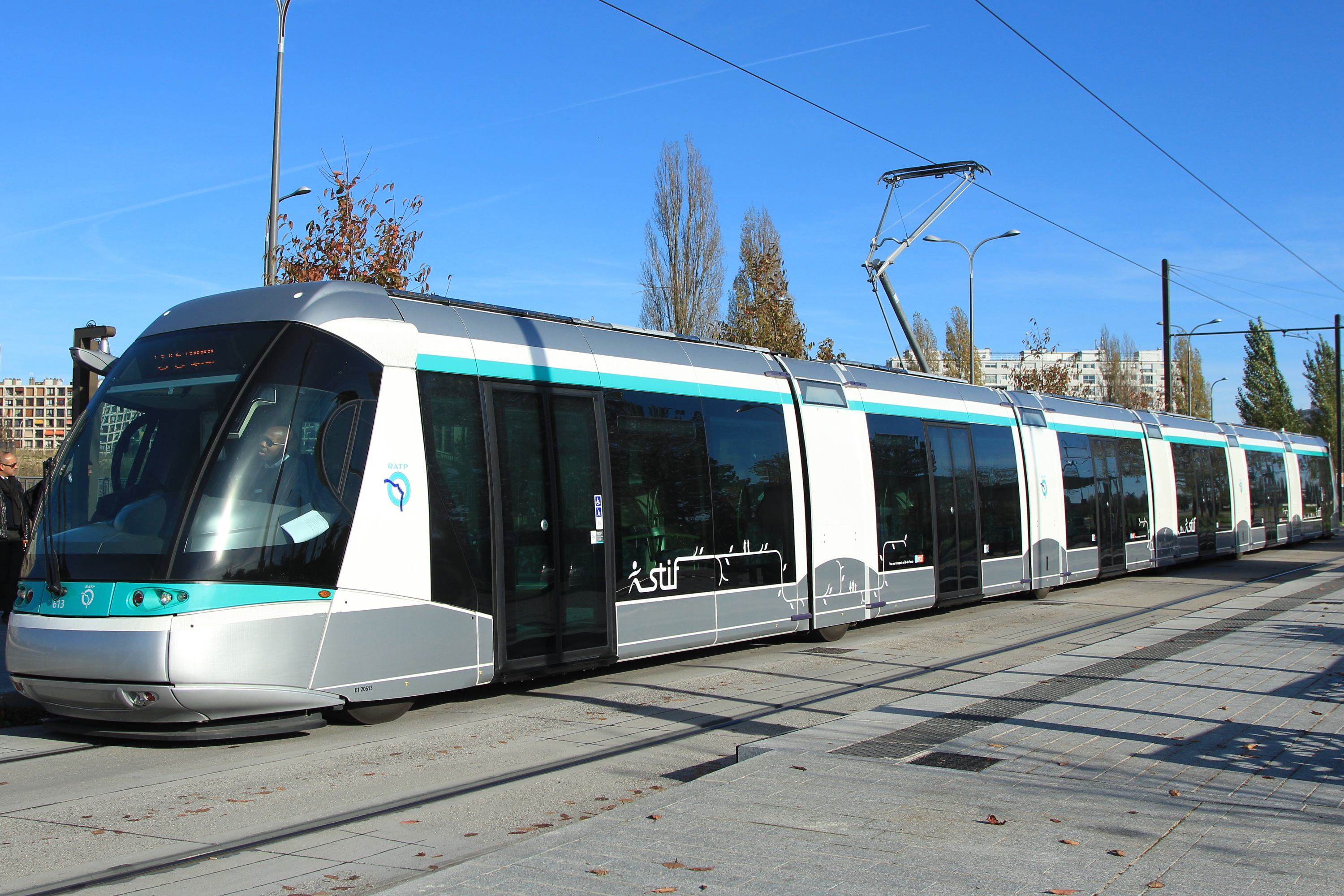 Un tramway de la ligne 6 en essais à la station « Centre commercial Vélizy 2 ».